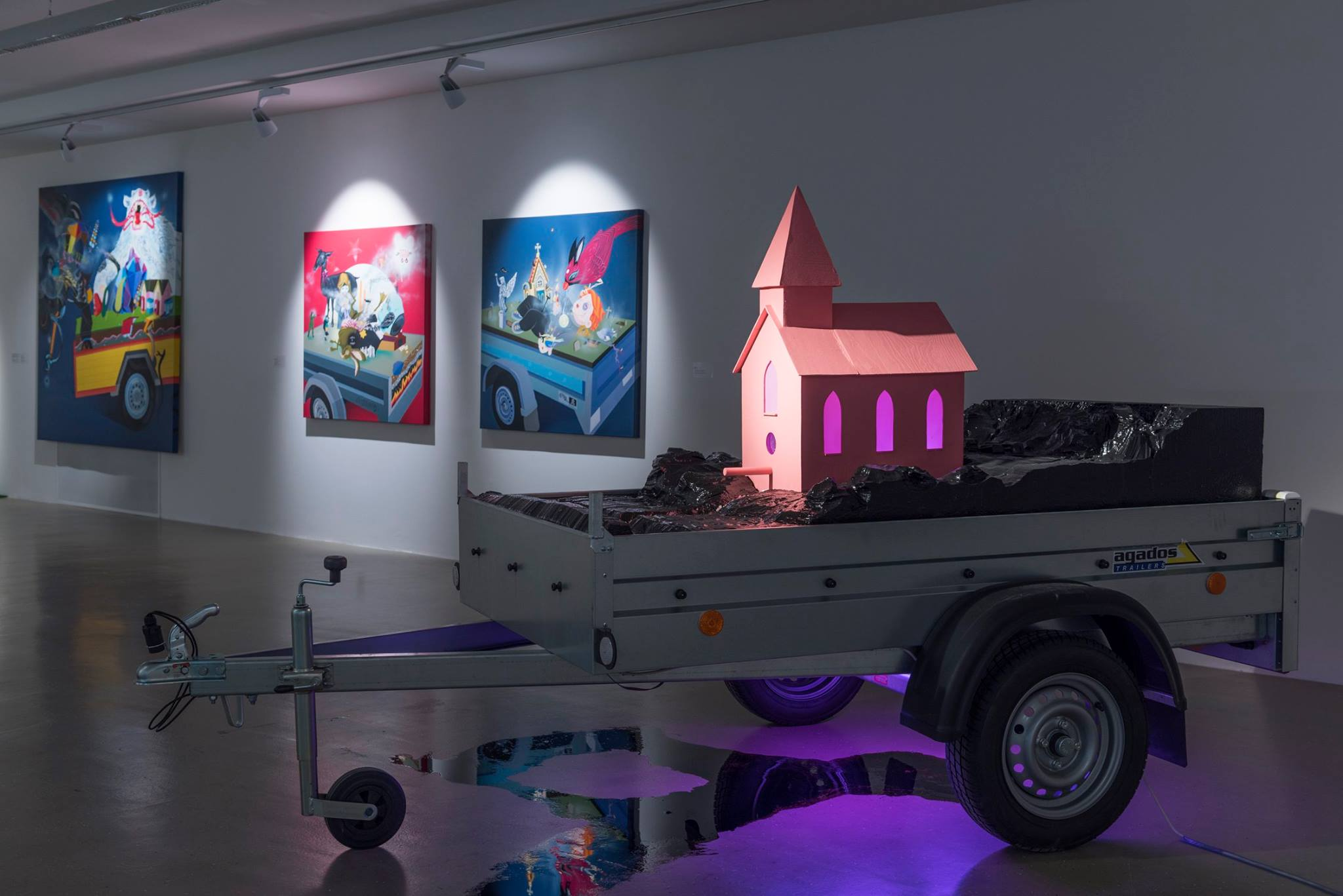 Erik Šille, at the heart of it all, 2017, objekt